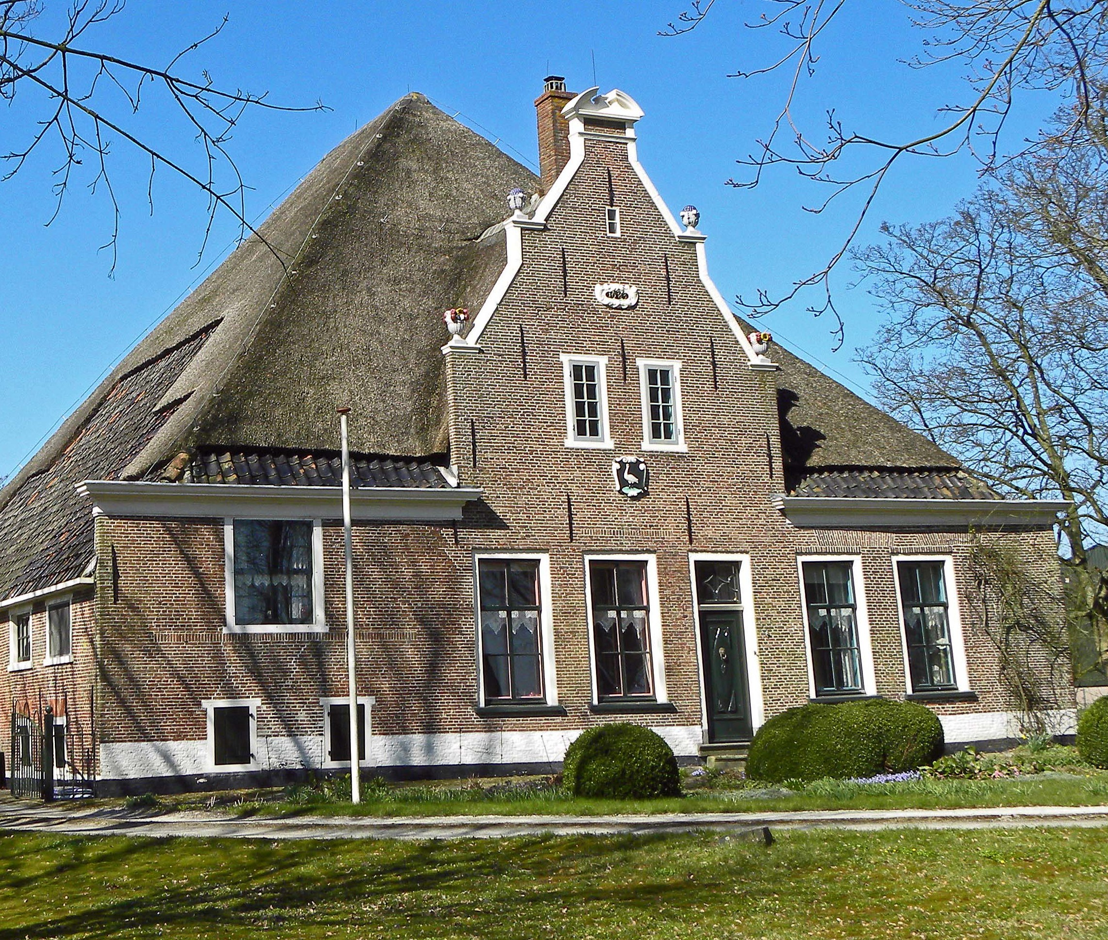 Stelphoeve "De Lepelaar"